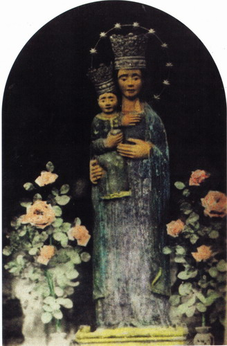 La Statua della Madonna del Divin Figliolo o del Robore Grosso,opera lignea del secolo XI. Trafugata da ignoti nel 1974 dalla Chiesa Madre di Santa Maria di Licodia.